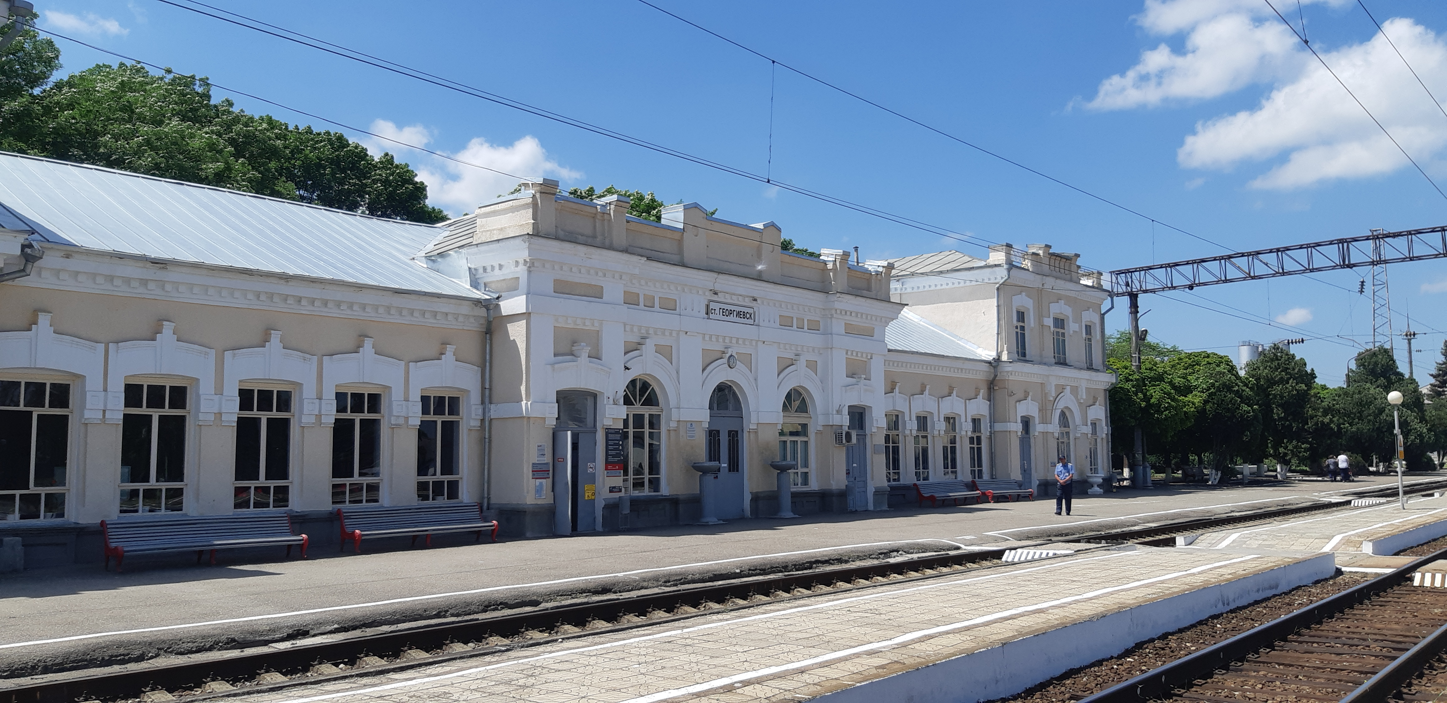 Железнодорожнй вокзал Георгиевска. Памятник архитектуры начала 20 века.